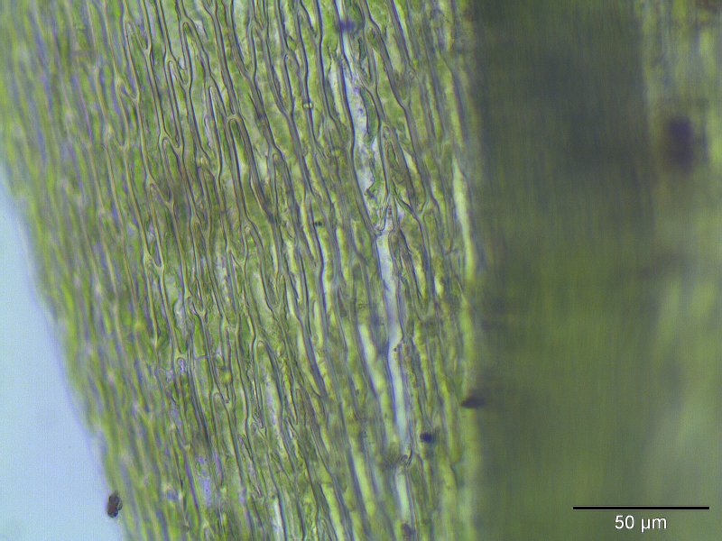 Ufer-Schnabeldeckenmoos (Rhynchostegium riparioides bzw. Platyhypnidium riparioides), Laminazellen, Vergrößerung: 400x